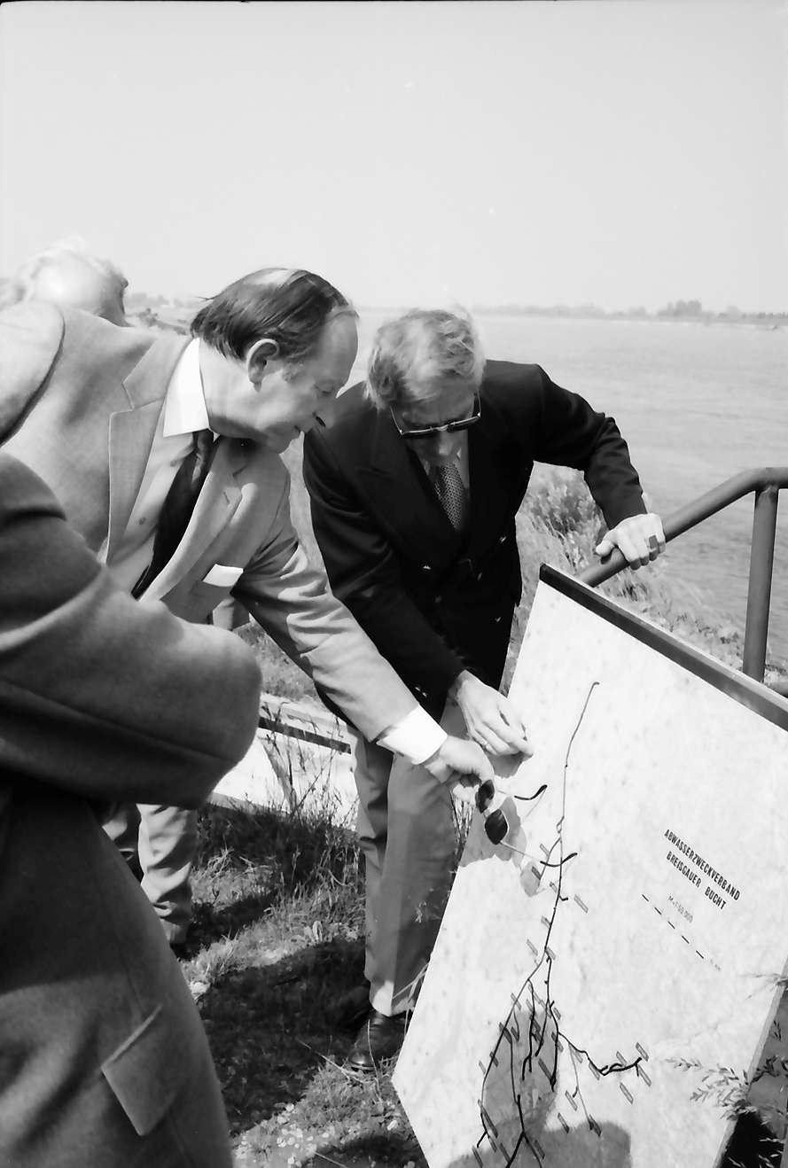 W 134 Sammlung Willy Pragher I: Filmnegative II, Bildordner 311-787 / ca. 1930-1992 Regierungspräsidium Freiburg 2 [Filmnegative, Ordner 0738] Kappel: Ministerpräsident Dr. Filbinger besichtigt Taubergießen Kappel: Ministerpräsident Dr. Filbinger besichtigt Taubergießen; Gruppe bei Kartenbesprechung